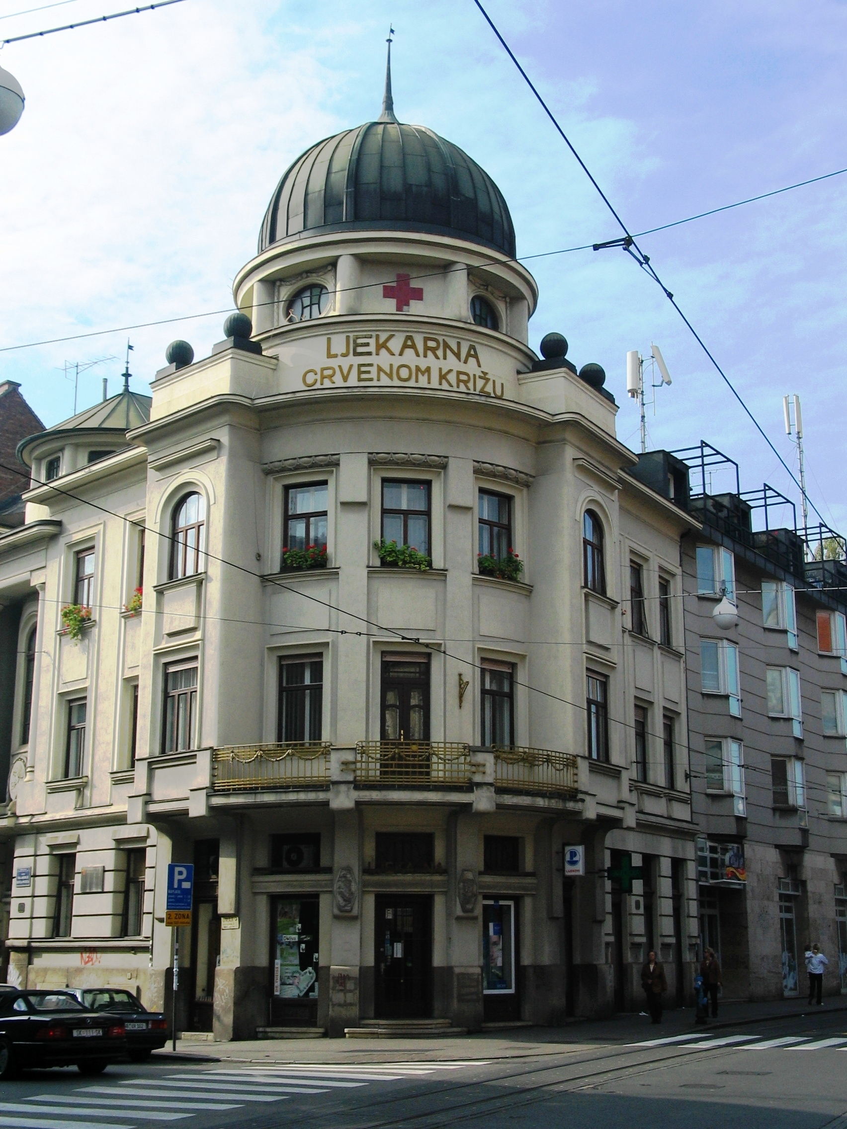 Stjepan Podhorsky- Kuća Gayer, Zagreb, 1907. - 1908.